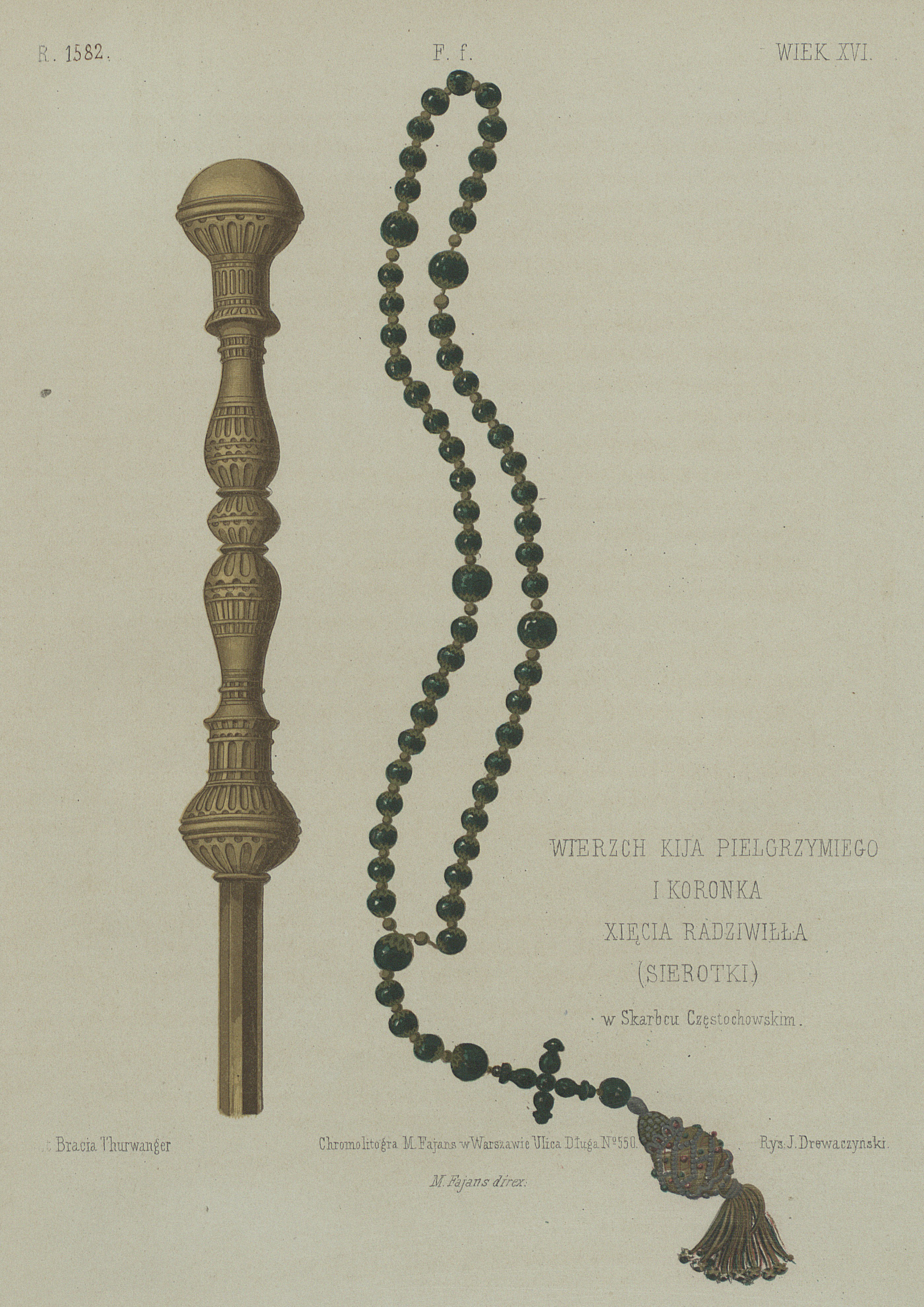 Беларуская (тарашкевіца): Кій і ружанец Мікалая Радзівіла «Сіроткі» (Mikałaj Radzivił «Sirotka»)